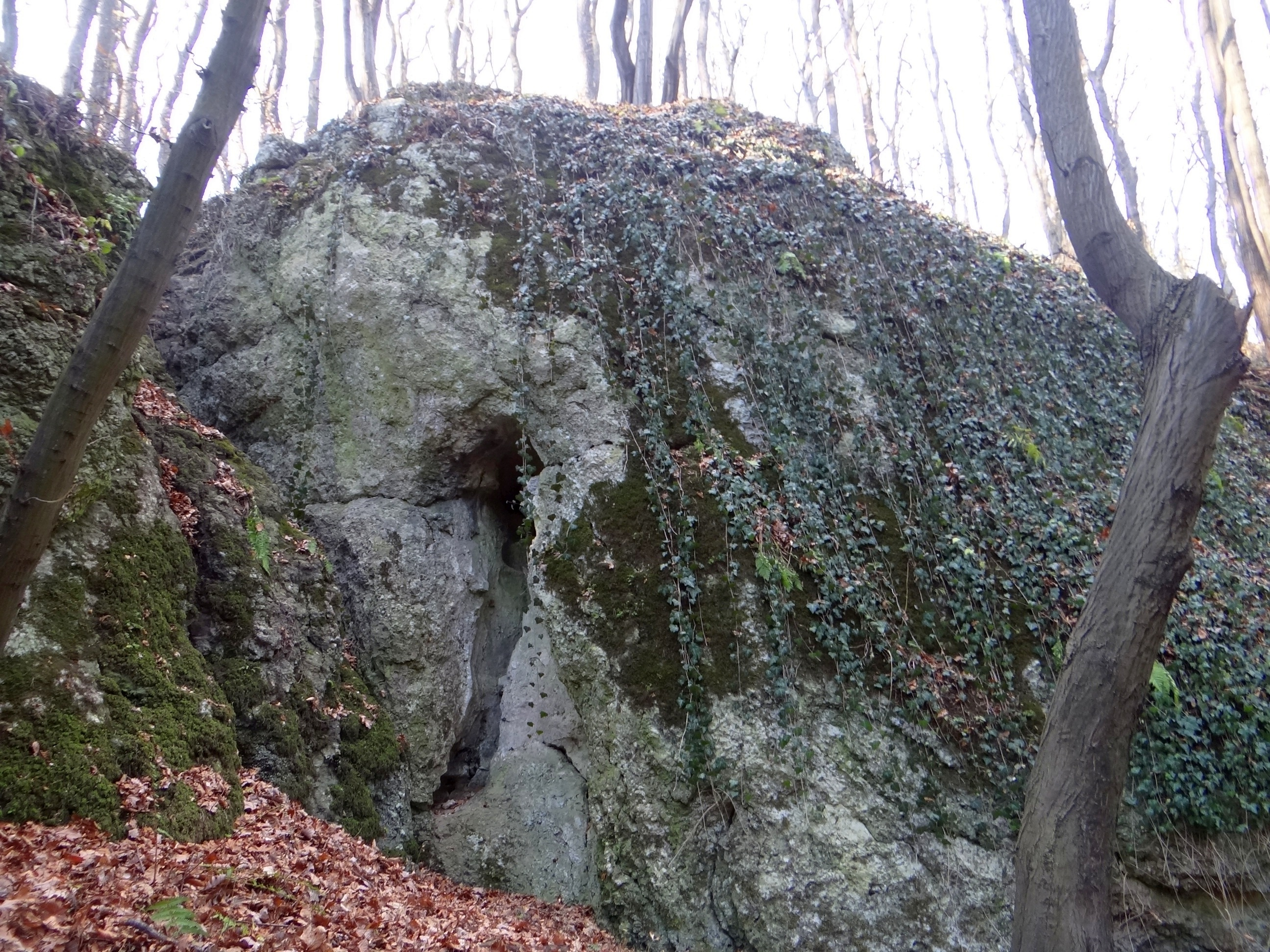 Meander w Wąwozie Półrzeczki